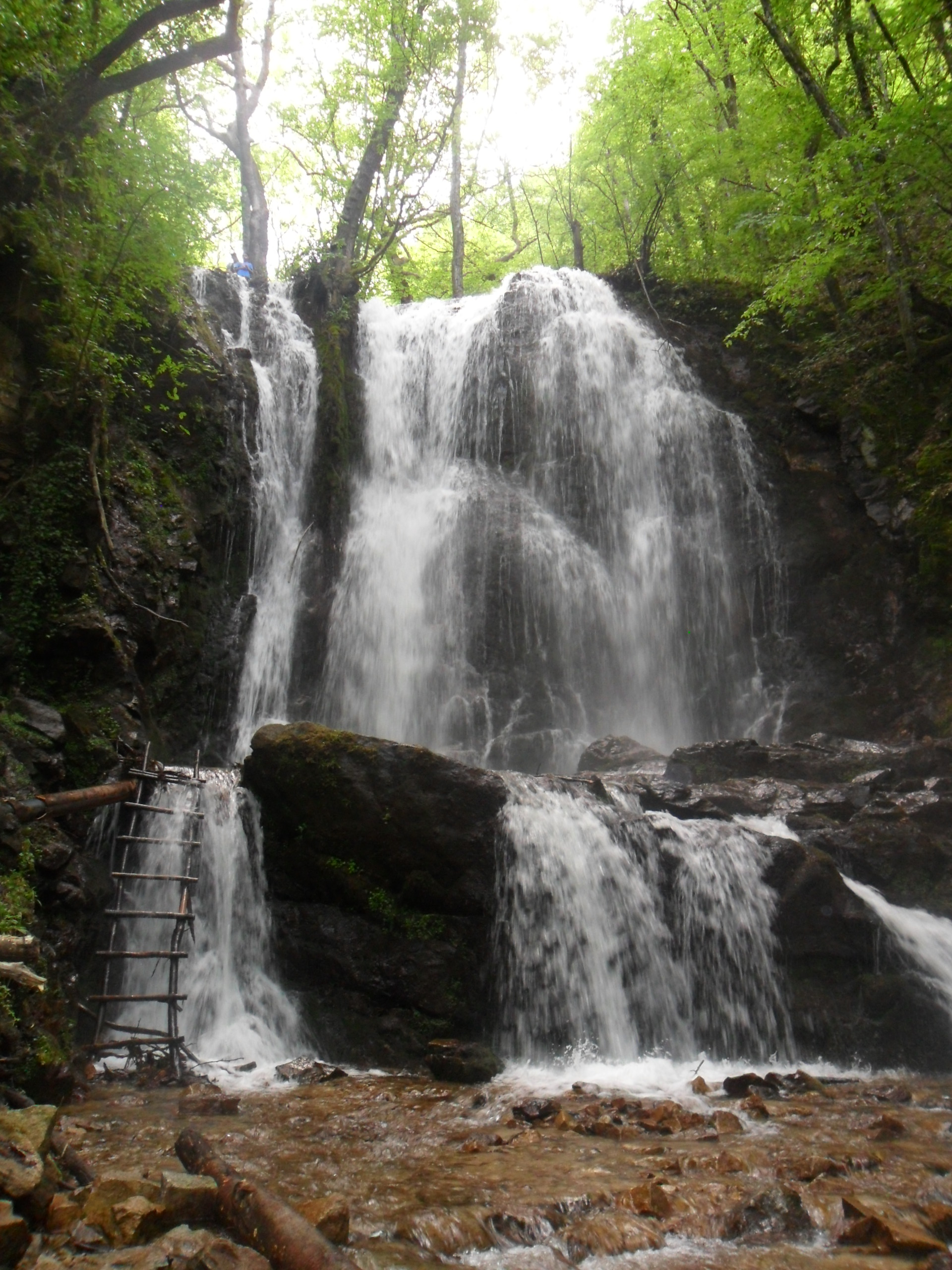 Kolešinski vodopadi,Kolešino,Strumica,Macedonia